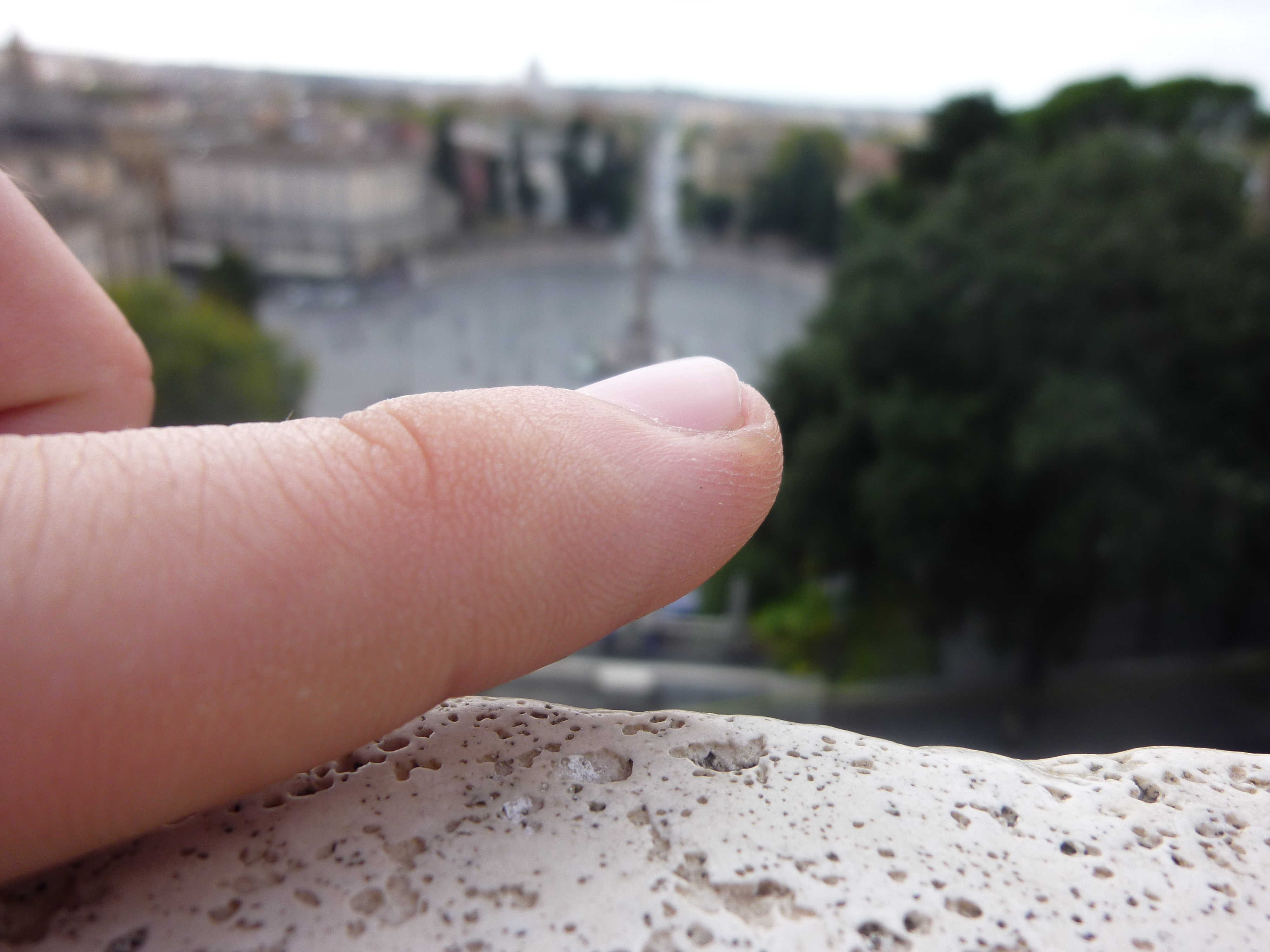 finger,אצבע על רקע נוף רומאי